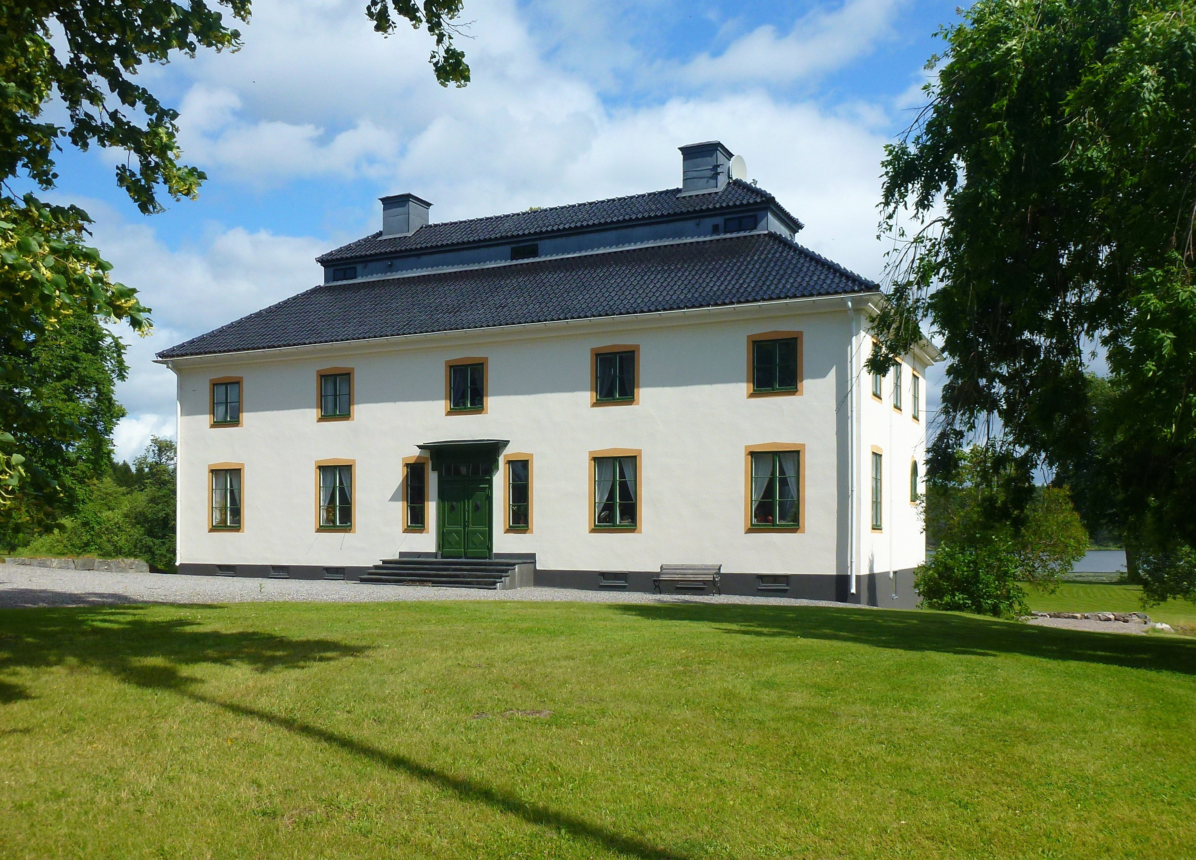 Molnsätra gård, huvudbyggnad, arkitekt Wolter Gahn